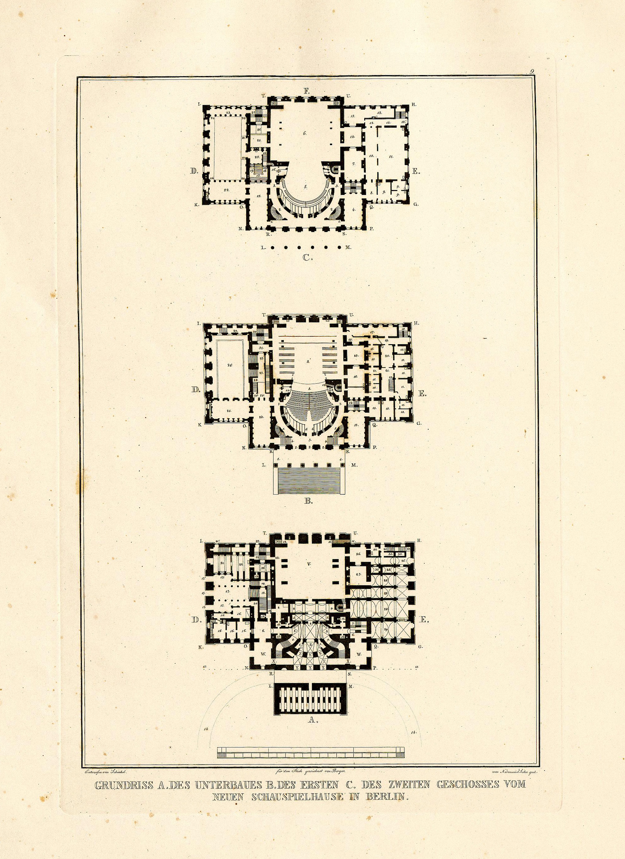 Schauspielhaus Berlin, Grundrisse